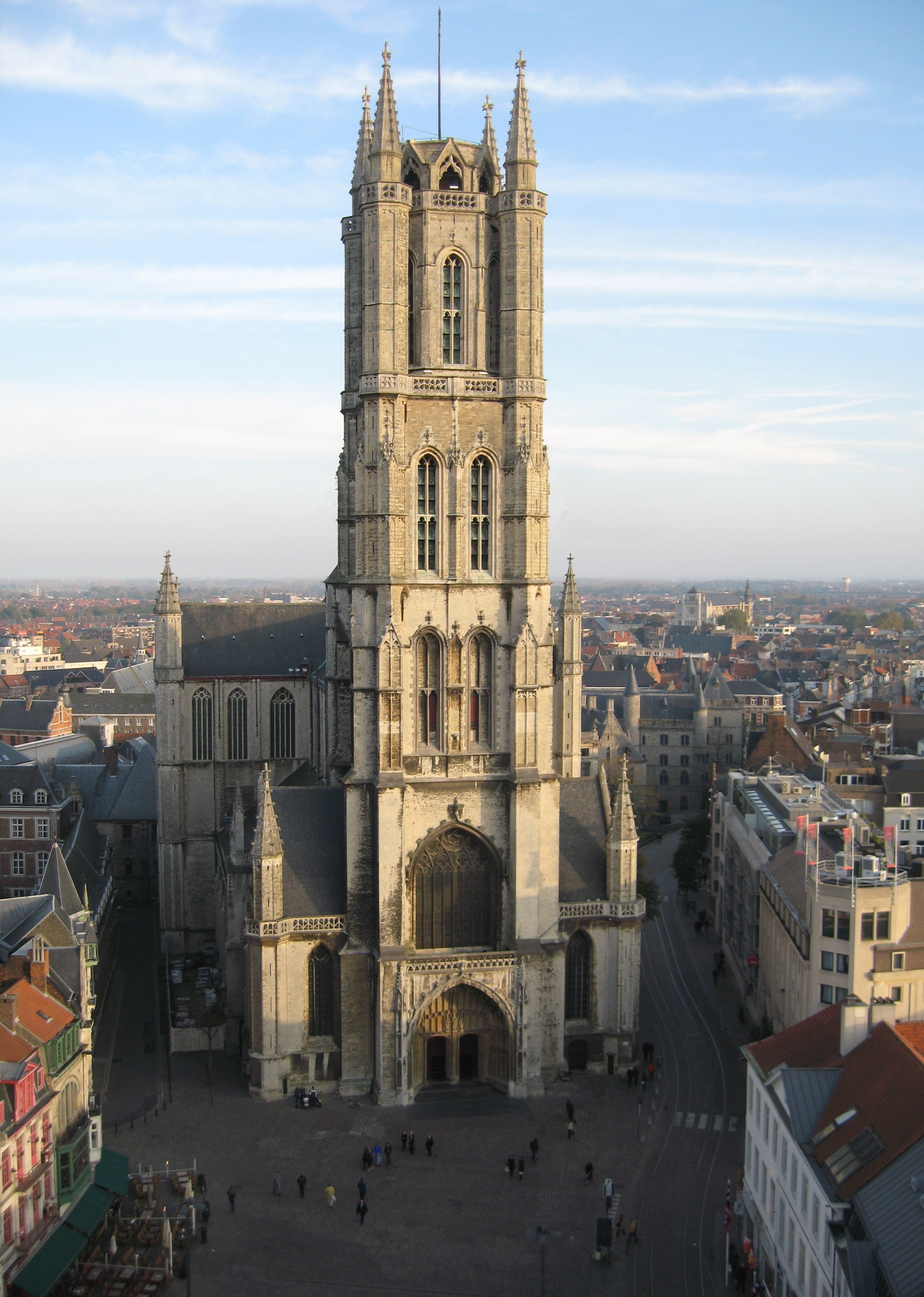 Sint-Baafskathedraal (St. Bavo's Cathedral) Ghent Belgium October